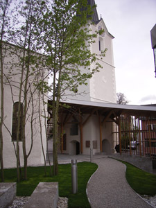 Kirche A-4713 Gallspach